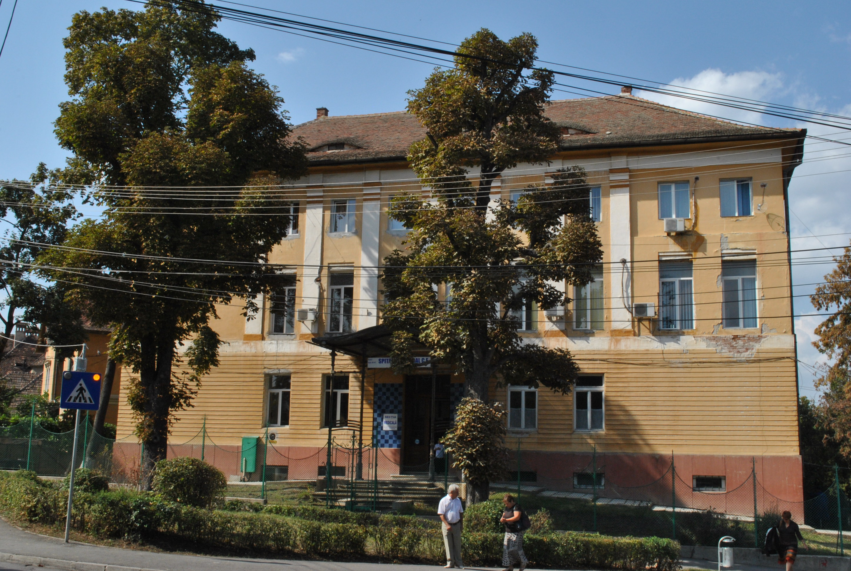 Spitalul C.F.R. sf. sec. XIX